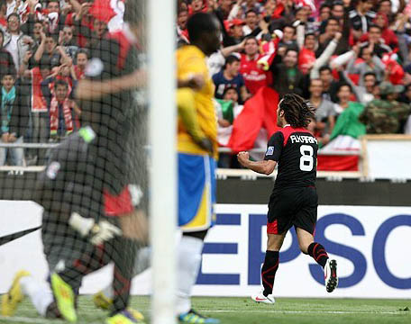 شادی پس از گل علی کریمی به الغرافه قطر - پرسپولیس ۱ - الغرافه ۱ - لیگ قهرمانان آسیا